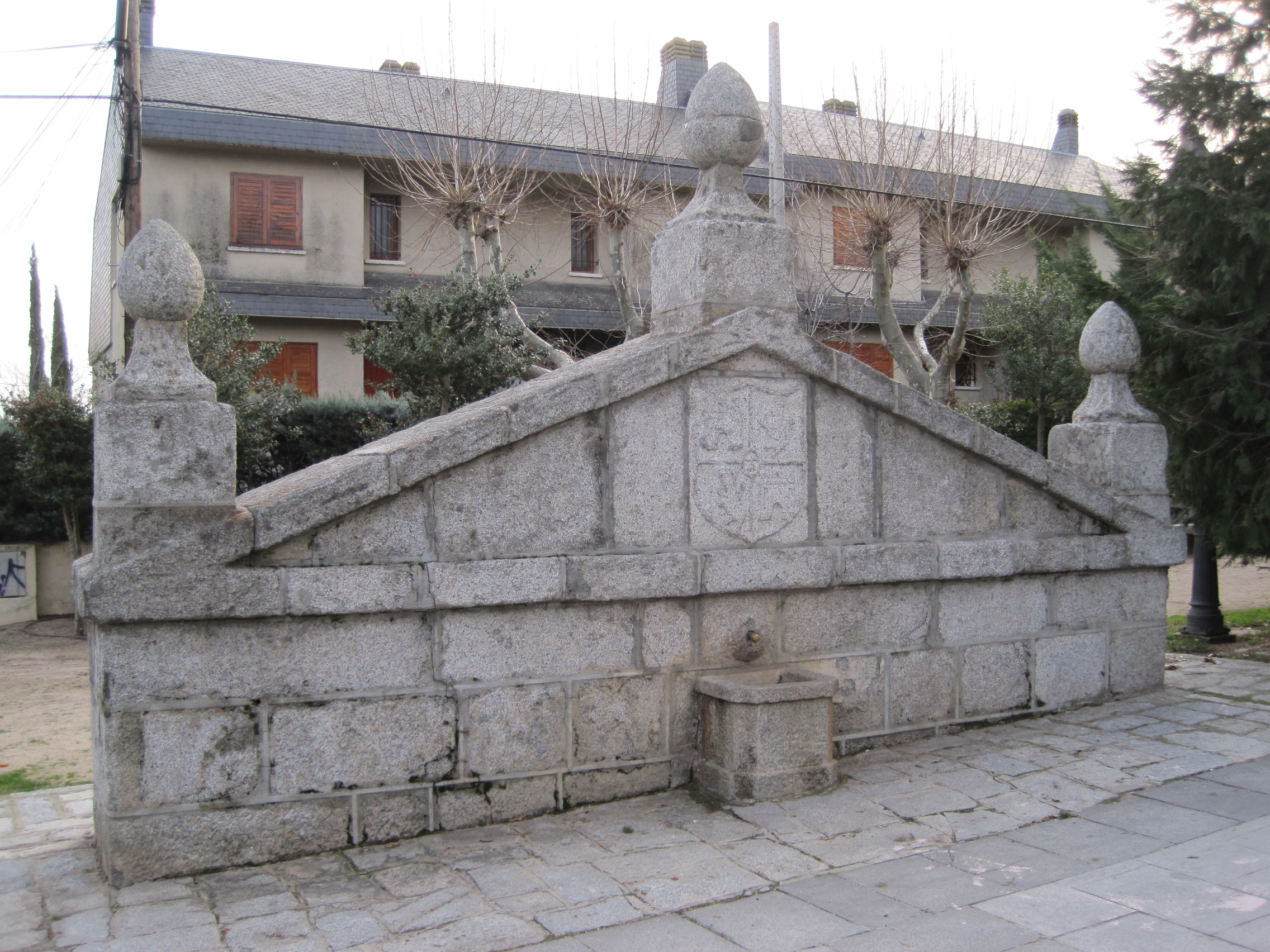 Fuente de San Sebastián, en El Escorial (Madrid, España).